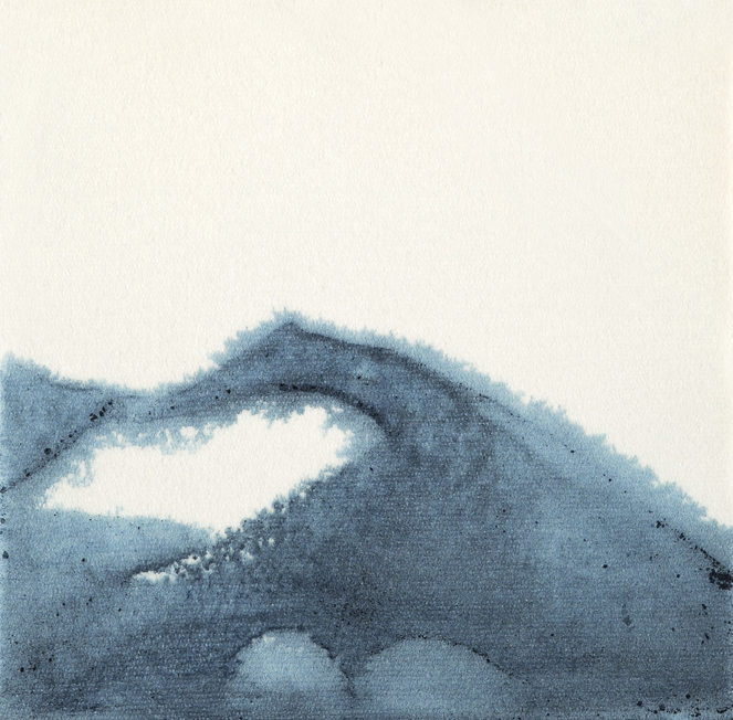 Imprégnation de pigments bleu sur papier (26 x 26 cm)